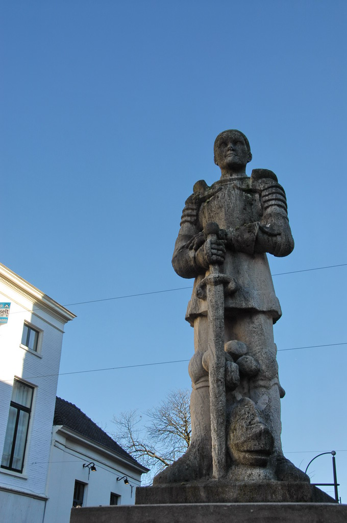 Duke of Gelre & Gulik and Count of Zutphen (1467-1538). Karel, Hertog van Gelre & Gulik en Graaf van Zutphen (1467-1538). Jansplaats Arnhem Made by Diskerhof & Hekman (1942-1949)